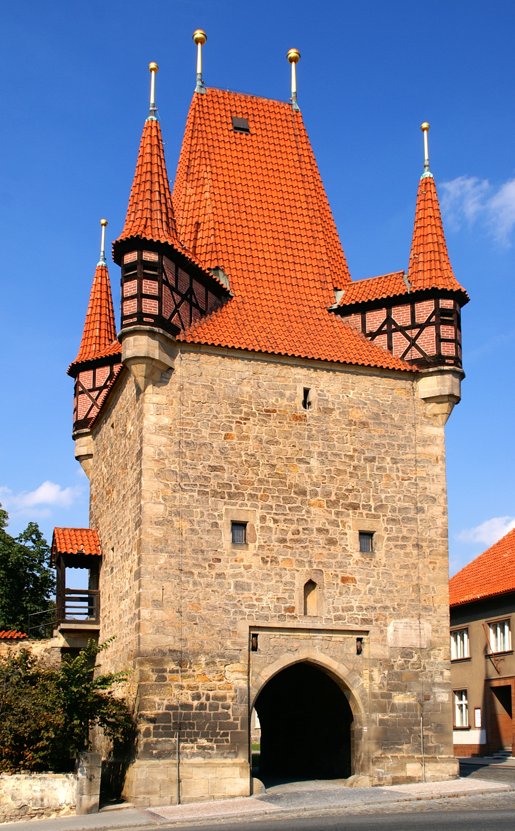 Pražská brána v Rakovníku